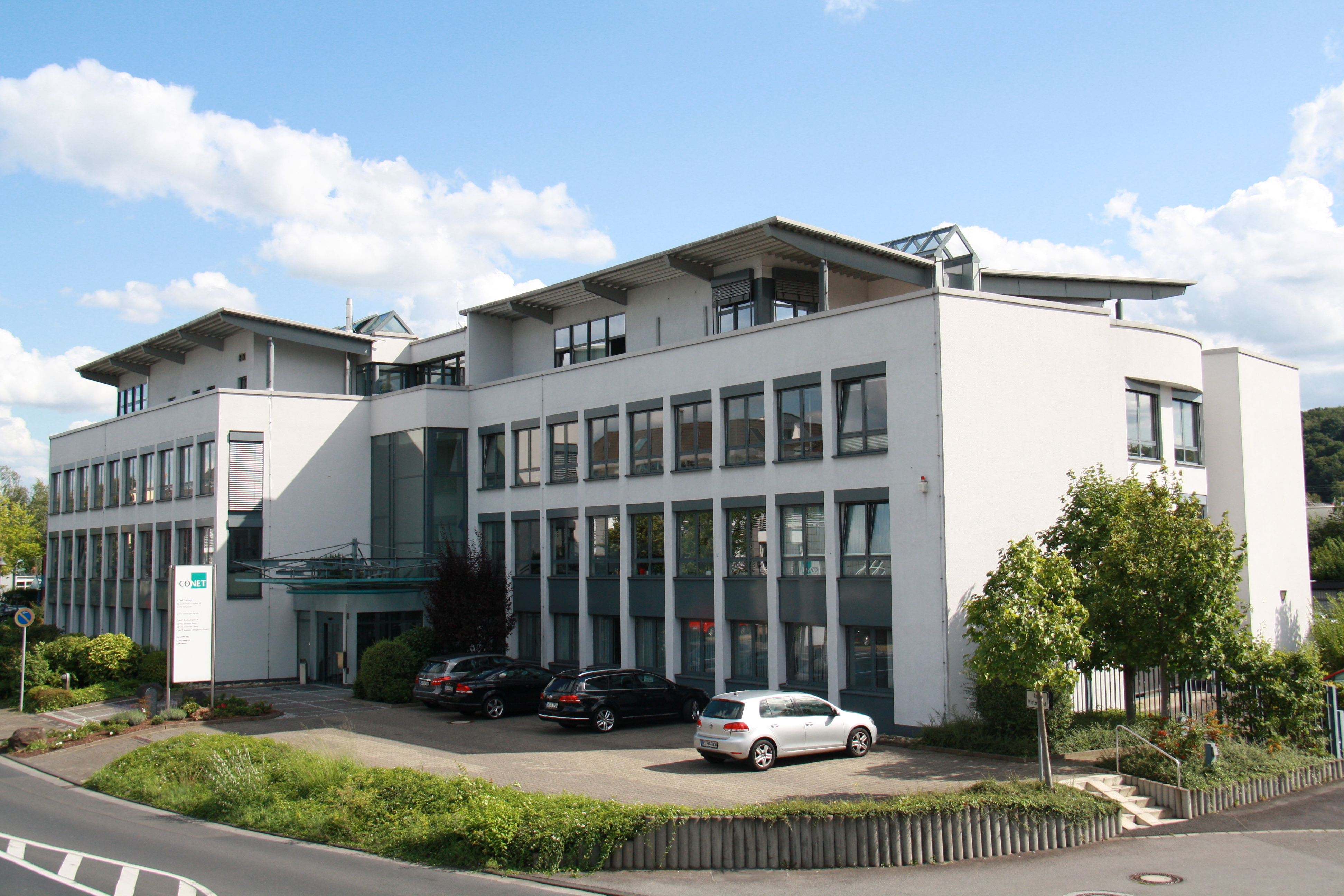 Stammsitz der Unternehmensgruppe CONET an der Theodor-Heuss-Allee 19 in 53773 Hennef, Deutschland